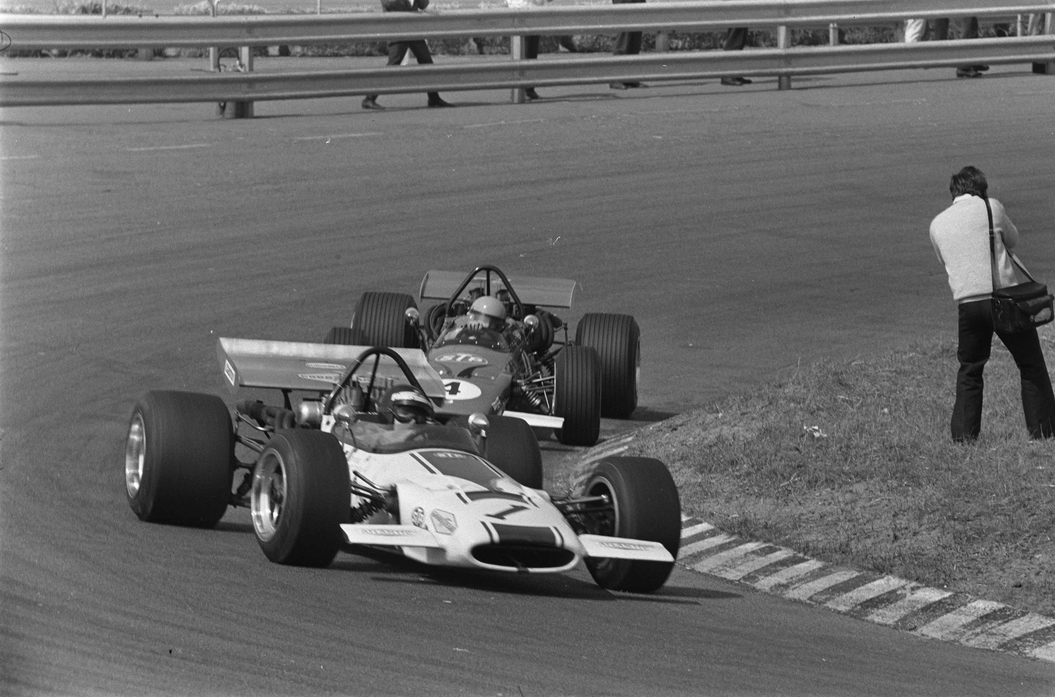 Collectie / Archief : Fotocollectie Anefo Reportage / Serie : 1970 Guards European Formula 5000 Championship te Zandvoort Beschrijving : Winnaar Peter Kenneth Gethin en Mike Walker in aktie Datum : 19 april 1970 Locatie : Noord-Holland, Zandvoort Trefwoorden : autoraces, circuits, coureurs, raceauto's Persoonsnaam : Gethin, Peter Kenneth, Walker, Mike Fotograaf : Fotograaf Onbekend / Anefo Auteursrechthebbende : Nationaal Archief Materiaalsoort : Negatief (zwart/wit) Nummer archiefinventaris : bekijk toegang 2.24.01.05 Bestanddeelnummer : 923-4533